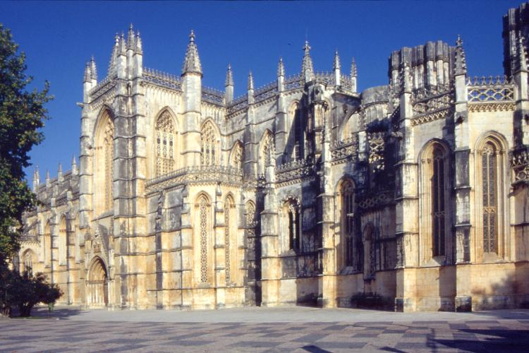 Außenansicht Kloster Batalha Andere Versionen: Zentrales Gewölbe der Capela do Fundador, Claustro Real